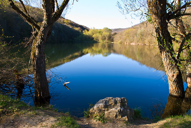 Пруд на реке Тавельчук, Крым.